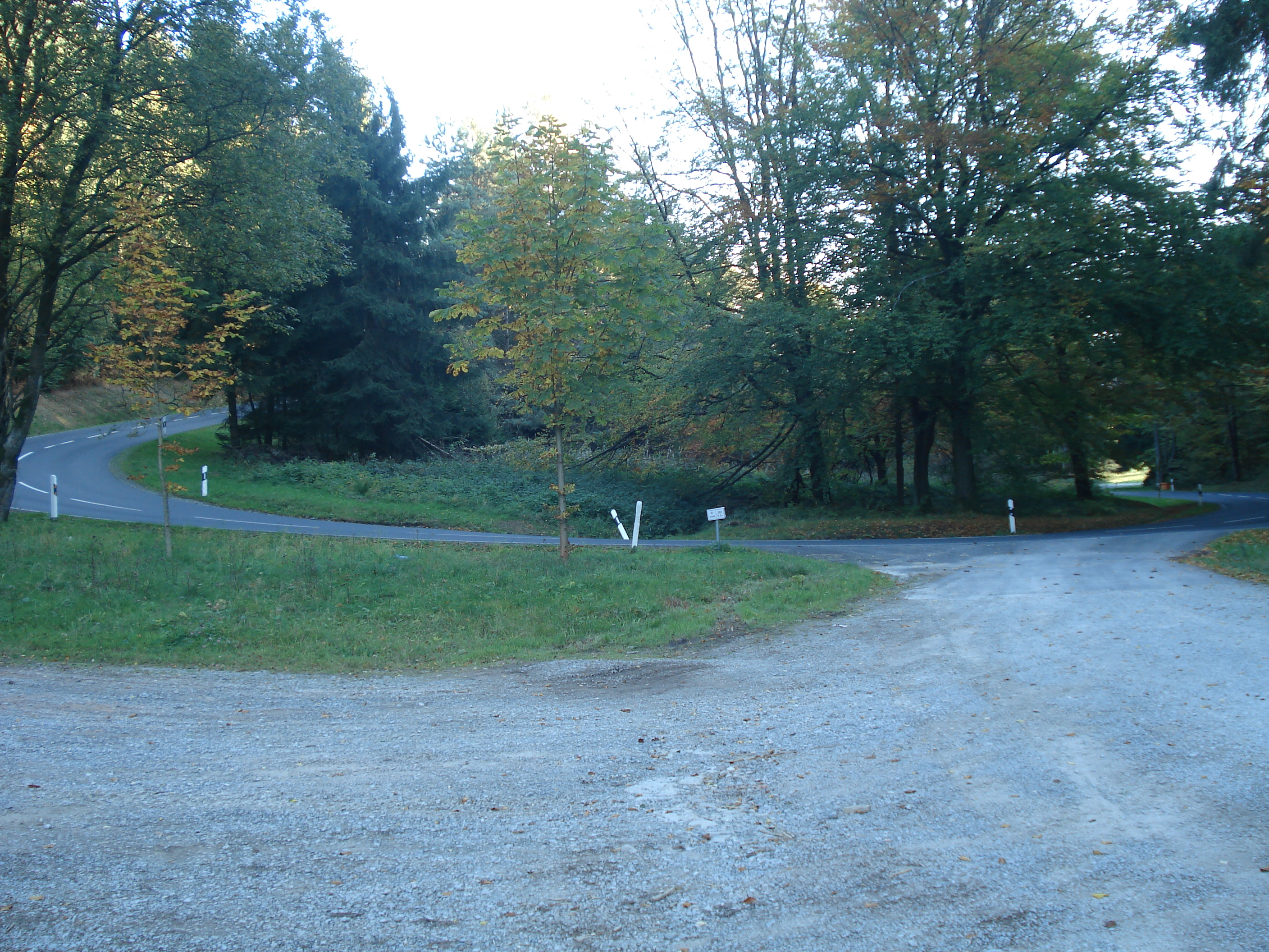 Die Spessart-Höhenstraße (Staatsstraße 2305) bei Wiesen